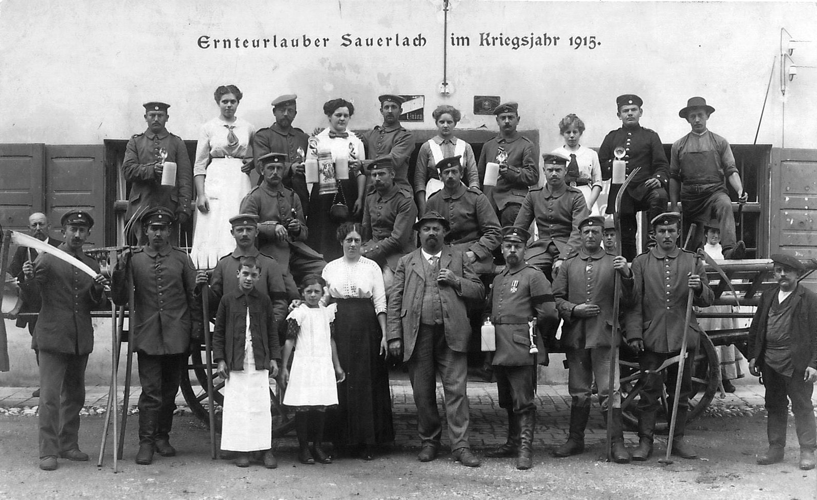 Postkarte_Gruppenbild von Ernteurlaubern im Kriegsjahr 1915